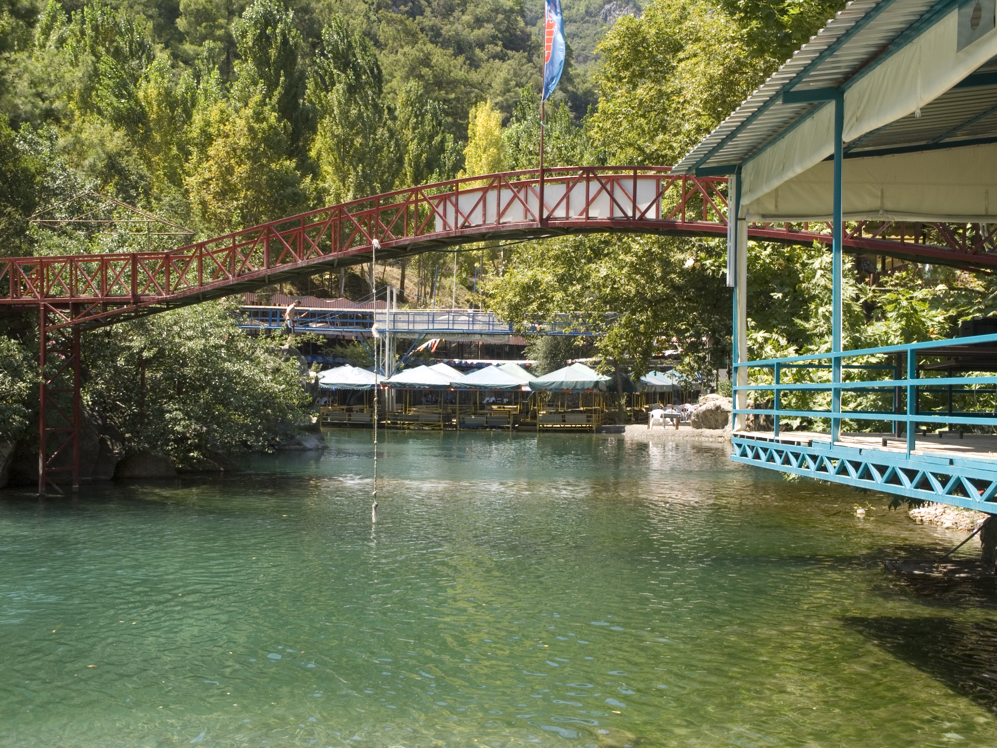 Турция, Аланья – река Дим-Чай